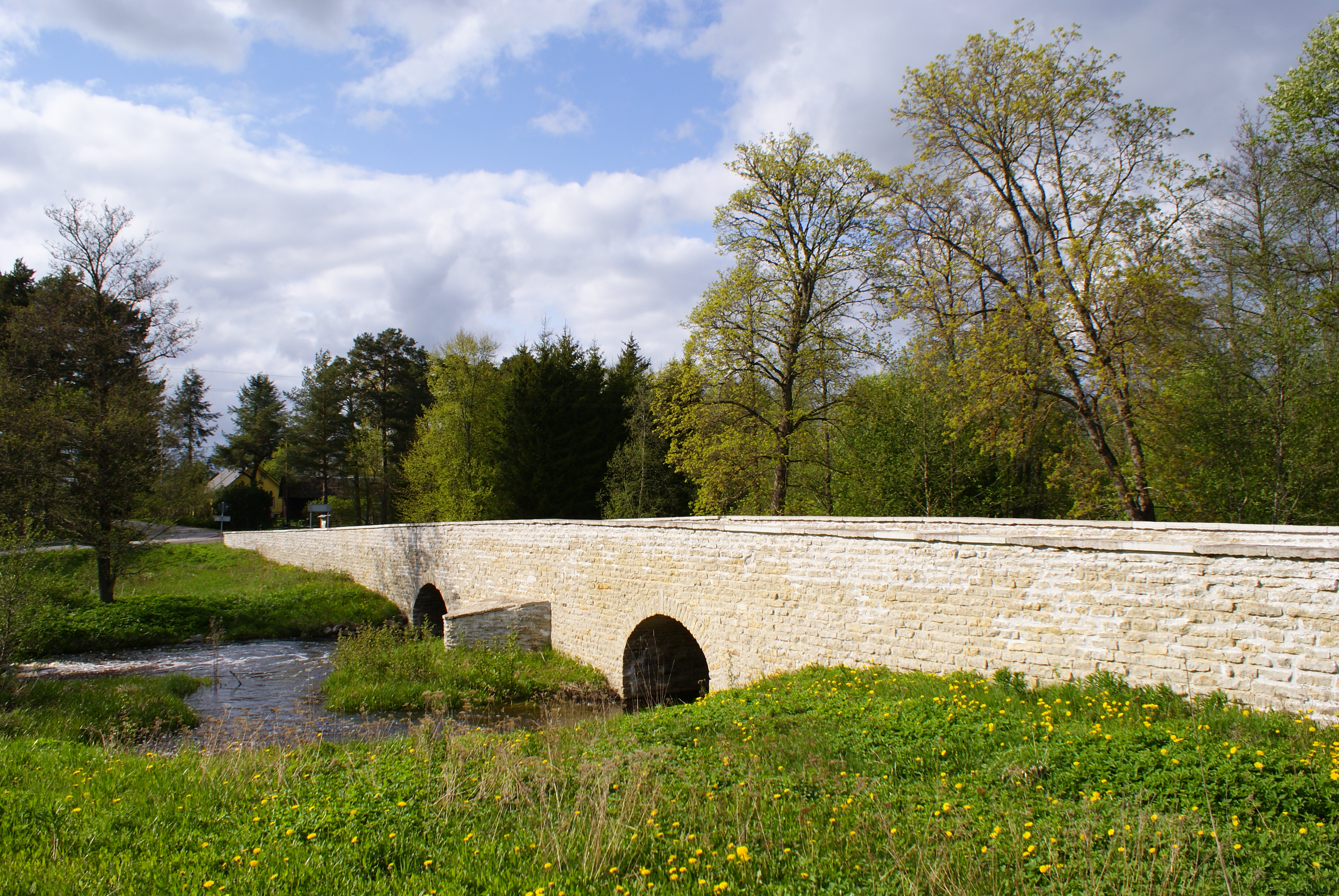 Kolga mõisa kivisild